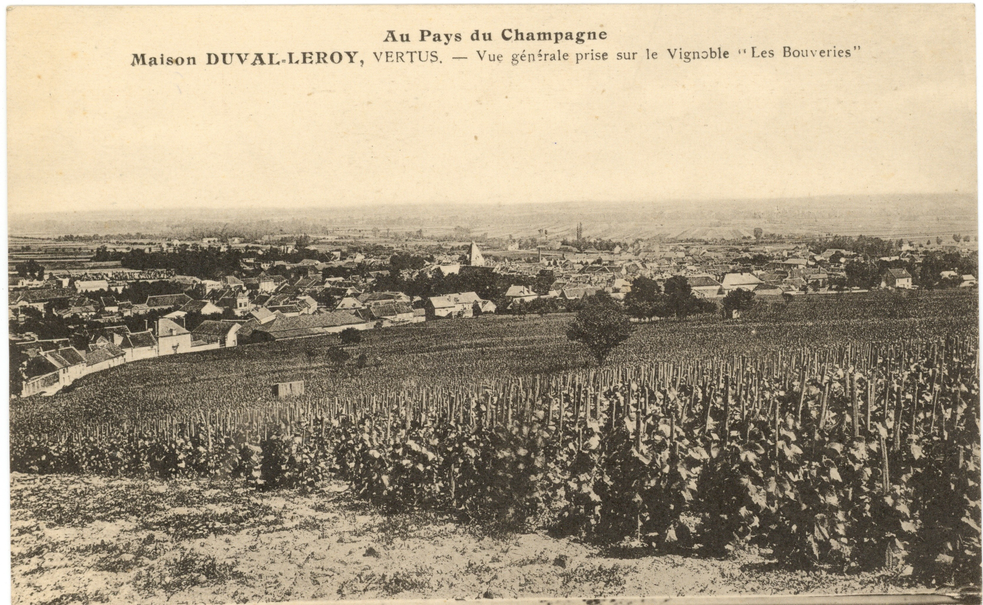 Le Clos des Bouveries est une parcelle de vigne du village de Vertus (1er Cru) orienté plein et situé à mi-coteau. Le Clos des Bouveries appartient historiquement à la maison de Champagne Duval-Leroy.